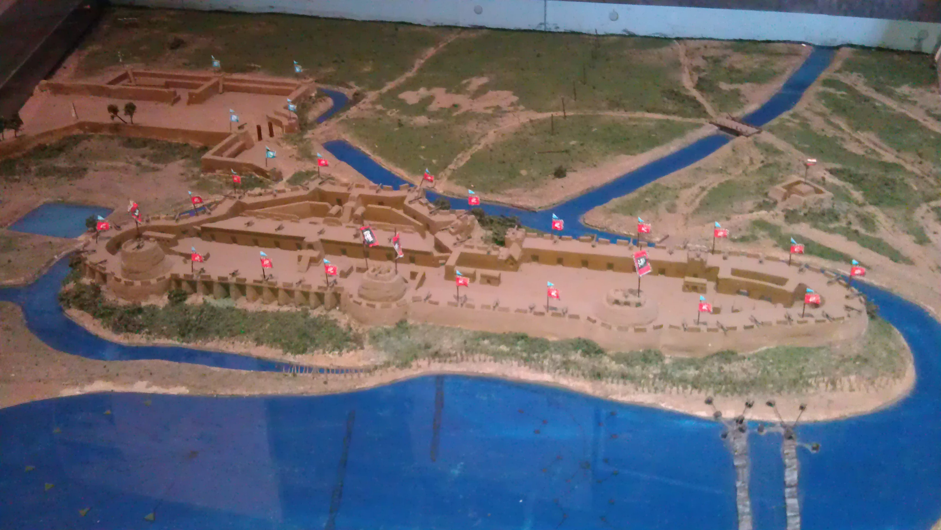 清末大沽口炮臺駐防復原圖